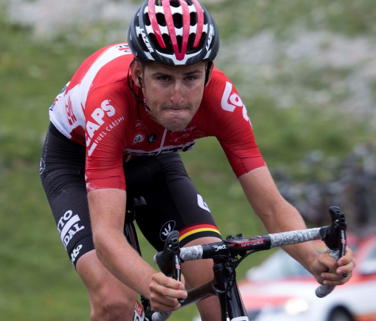 19-7_8 benoot